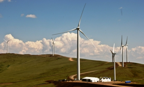 Tuabin gió ở Salkhit, Khongor, Darkhan-Uul, Mông Cổ